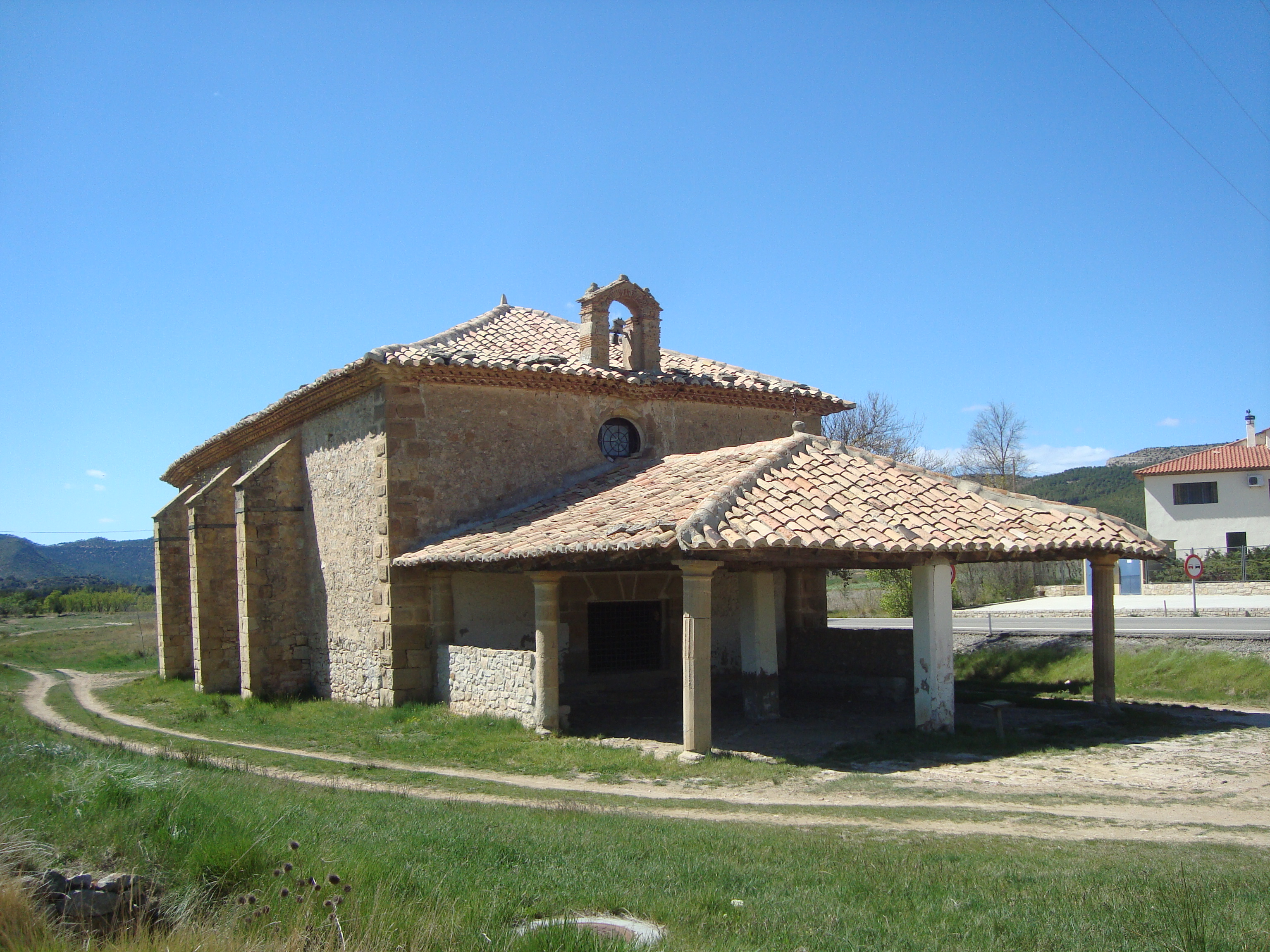 Ermita de San Roque ( Rubielos de Mora )